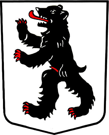 Wappen von Orsières, Wallis Ralf Hartemink 1996